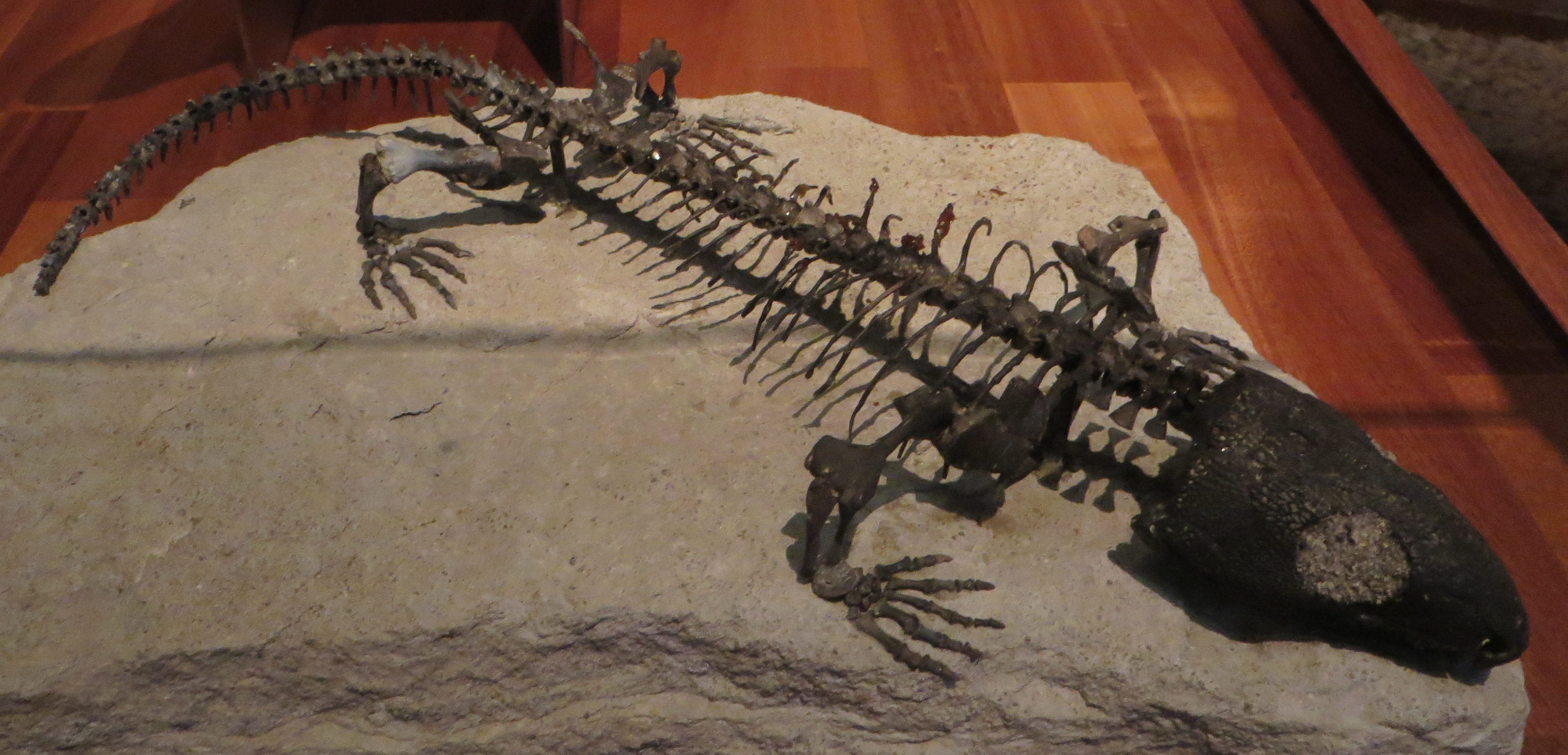 Fossil of Captorhinus - Took the picture at Museon, Den Haag